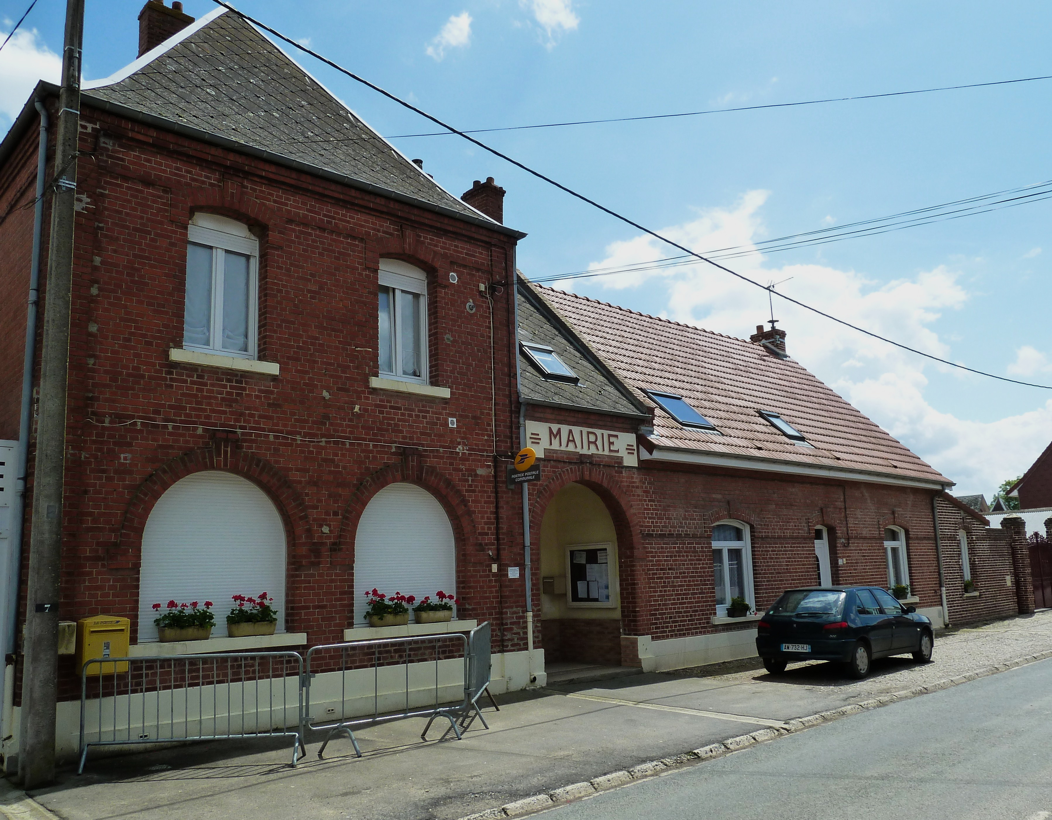 L’a Mairie de Chérisy Pas-de-Calais.- France.